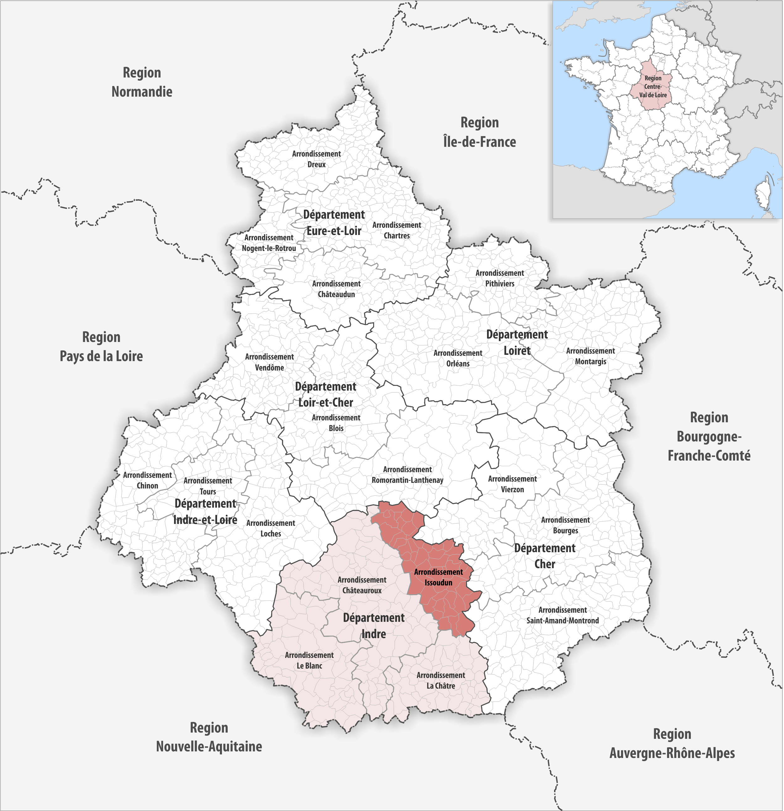 Lage des Arrondissements Issoudun